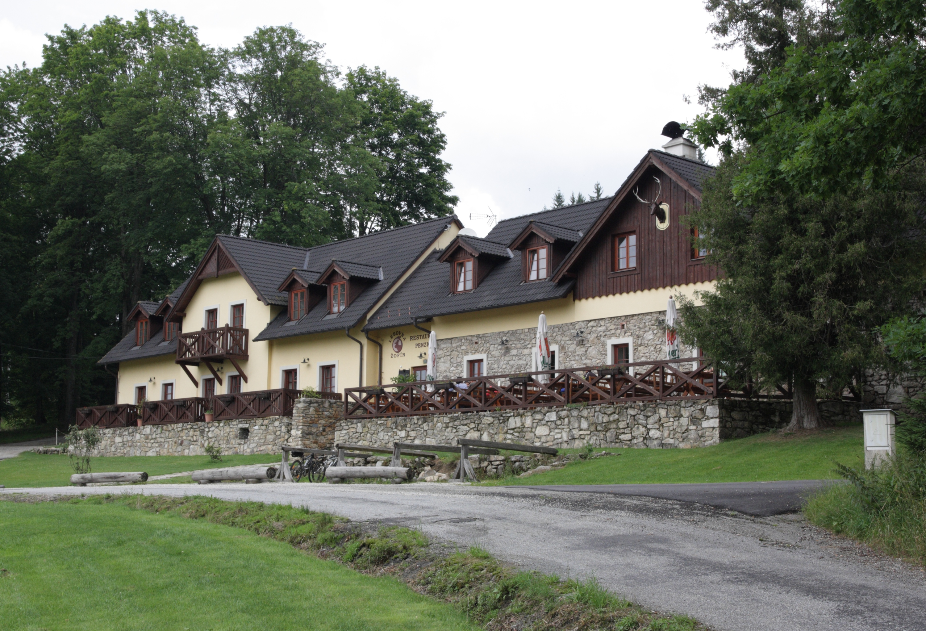 Žofín (Pohorská Ves) - Lesovna Žofín.